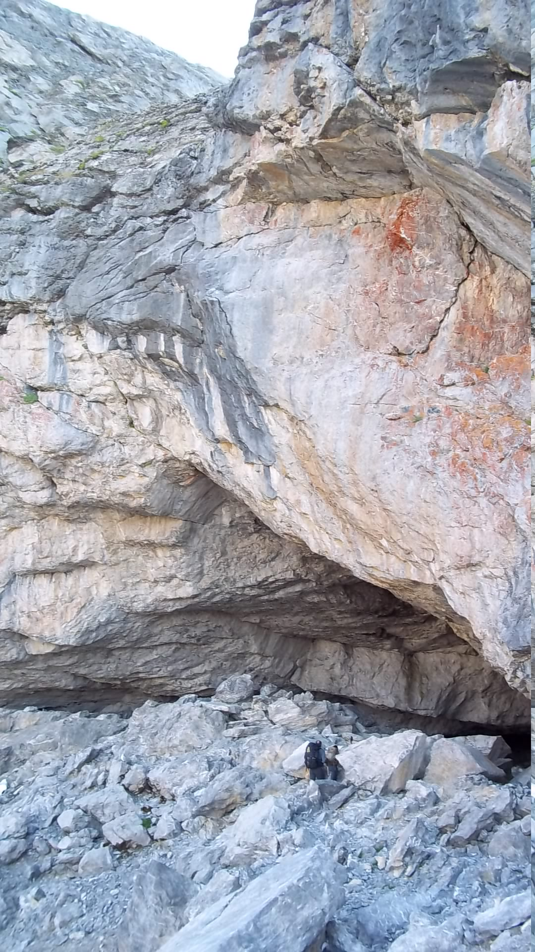 Gruta Casteret al Parc Nacional d'Ordesa i Mont Perdut This is a photography of a Site of Community Importance in Spain with the ID: ES0000016. Natura2000 entry, EEA entry